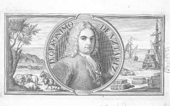 Jerónimo de Uztáriz. Ilustración de su Theórica y práctica de Comercio y Marina, segunda edición, Madrid, 1757